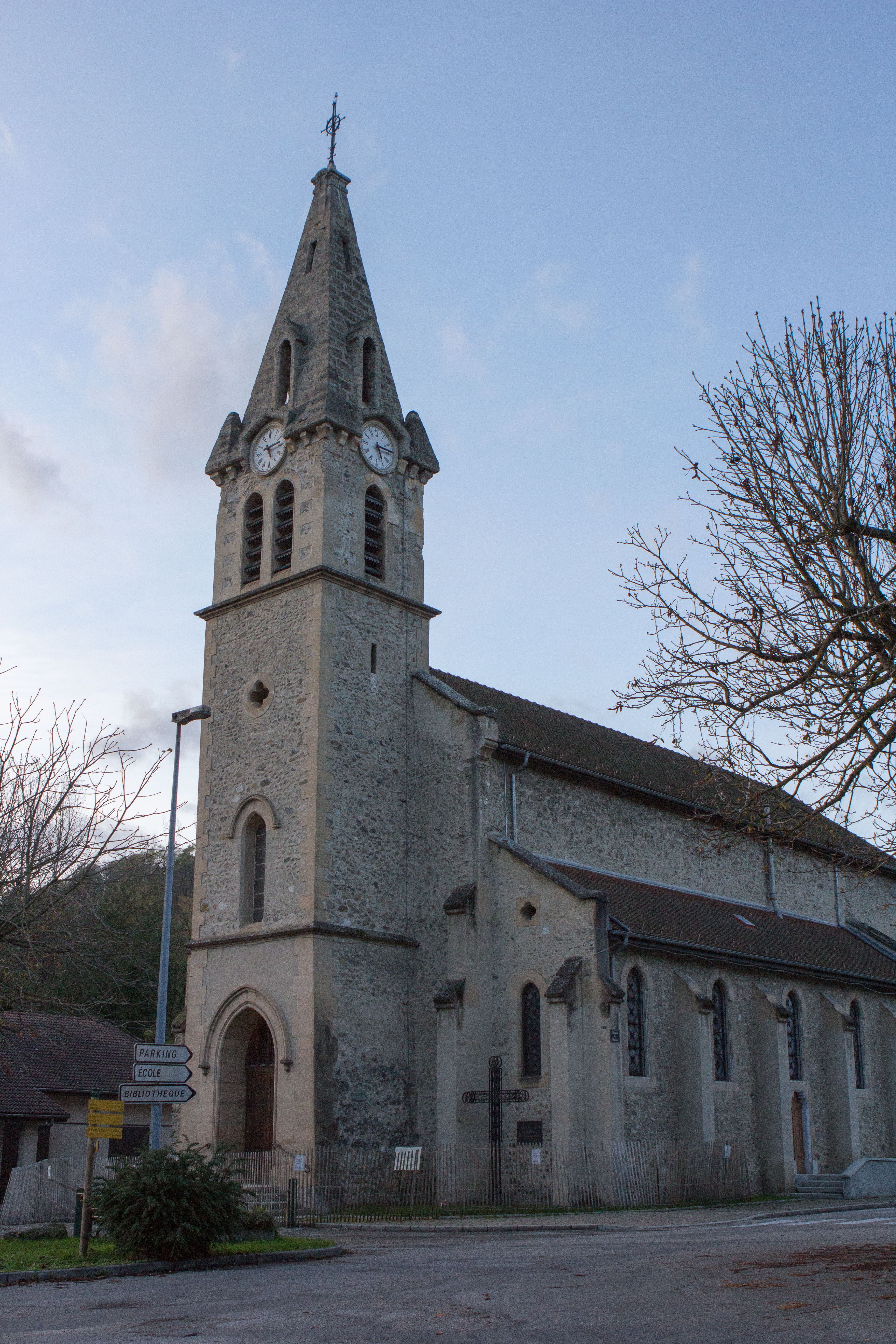 Église de Réaumont / Réaumont, Isère, France